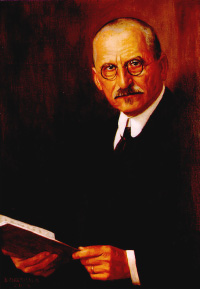 Srpskohrvatski / српскохрватски: Srpski matematičar Bogdan Gavrilović